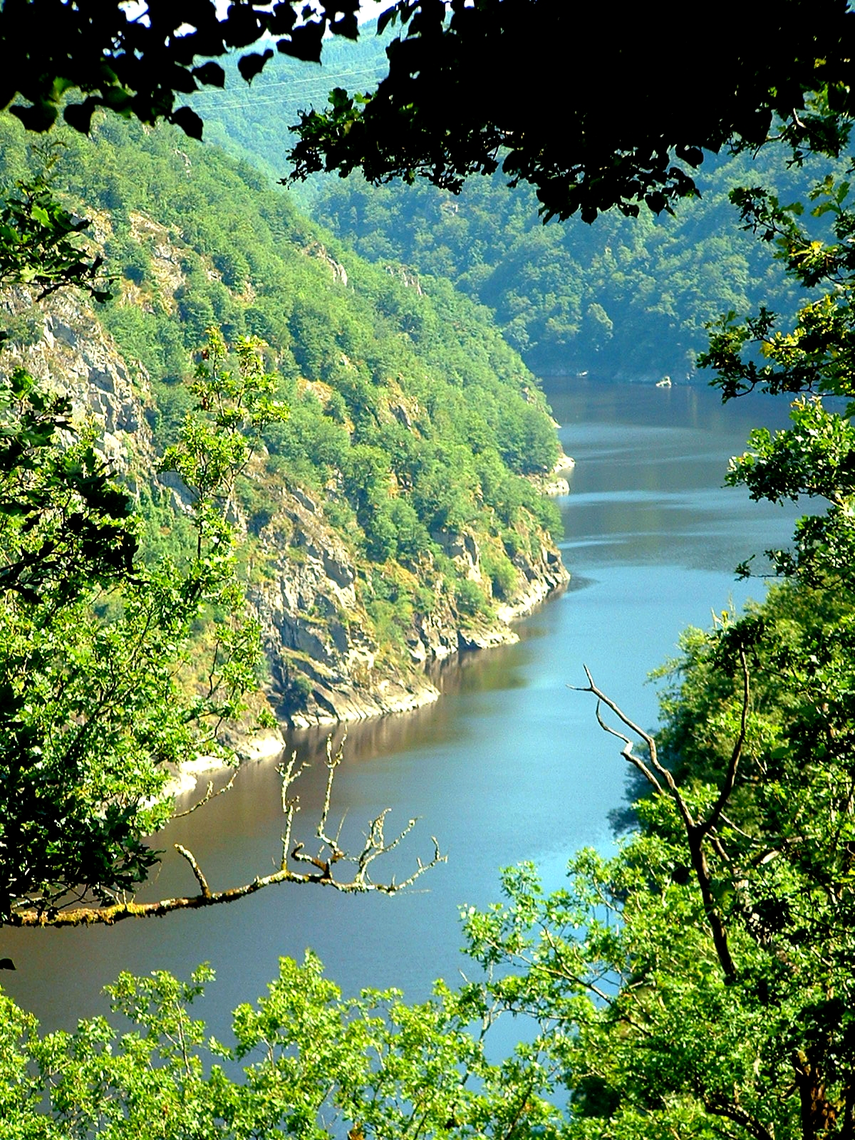 près de Liginiac, Corrèze, 2007.